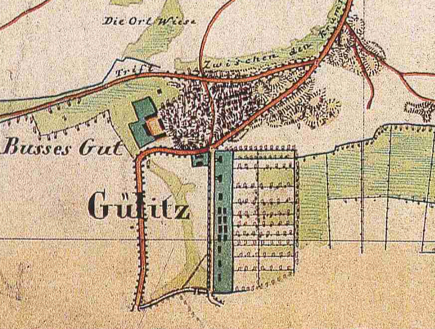 Raminsgut und Jülitz, Wohnplätze der Gemeinde Großderschau, Amt Rhinow, Landkreis Havelland, Brandenburg, Ausschnitt aus dem Urmesstischblatt von 1841